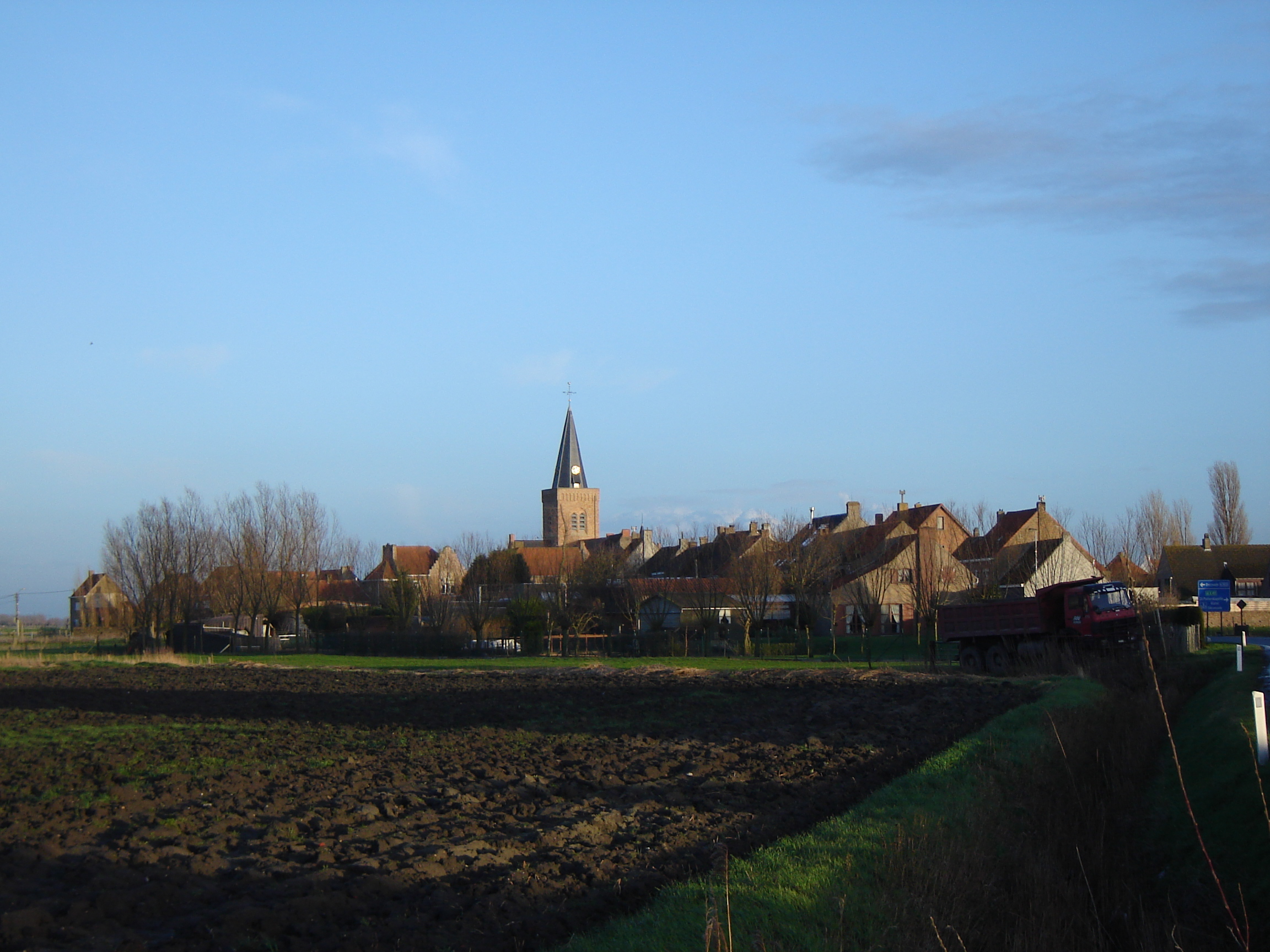 Village of Slijpe in Middelkerke, West Flanders, Belgium